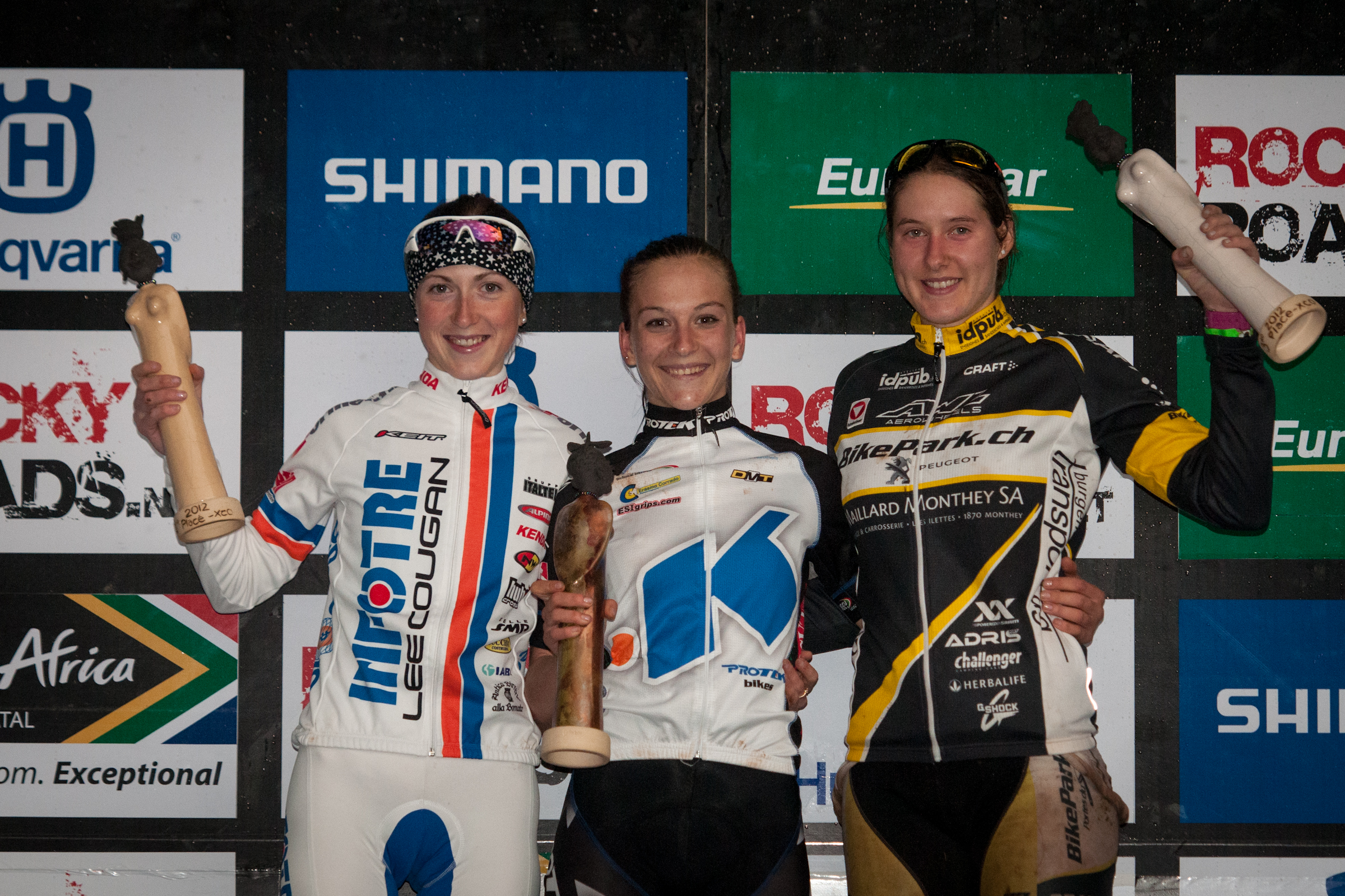 Ekaterina Anoshina, Russian cyclist